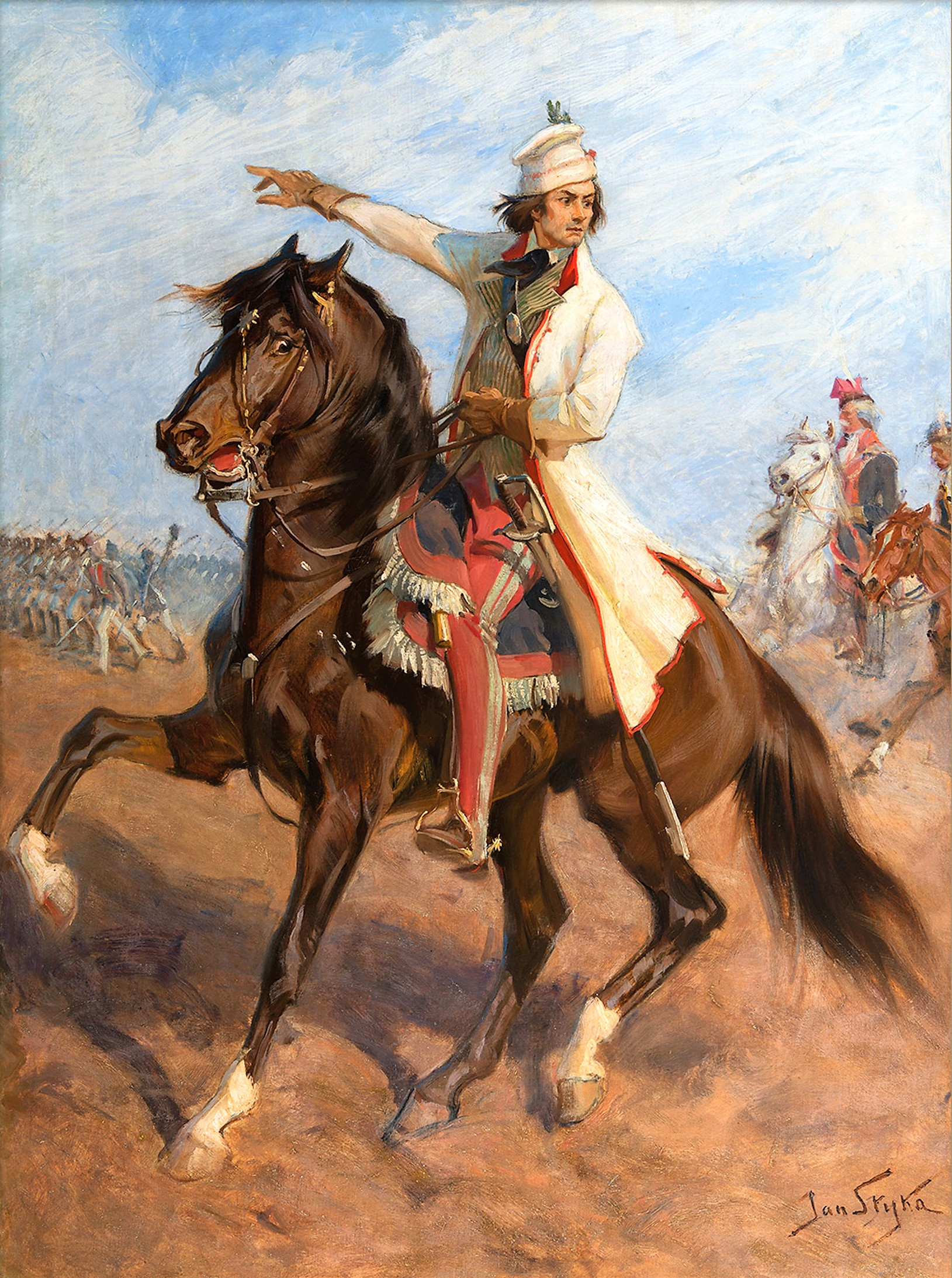 Szkic wspólny do "Panoramy Racławickiej"